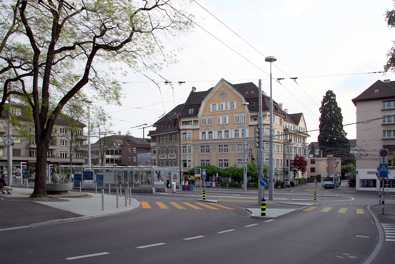 Hegibachplatz in Zürich